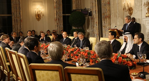 Cena del día 14 de noviembre de 2008 en la cumbre del G-20 en Washington.